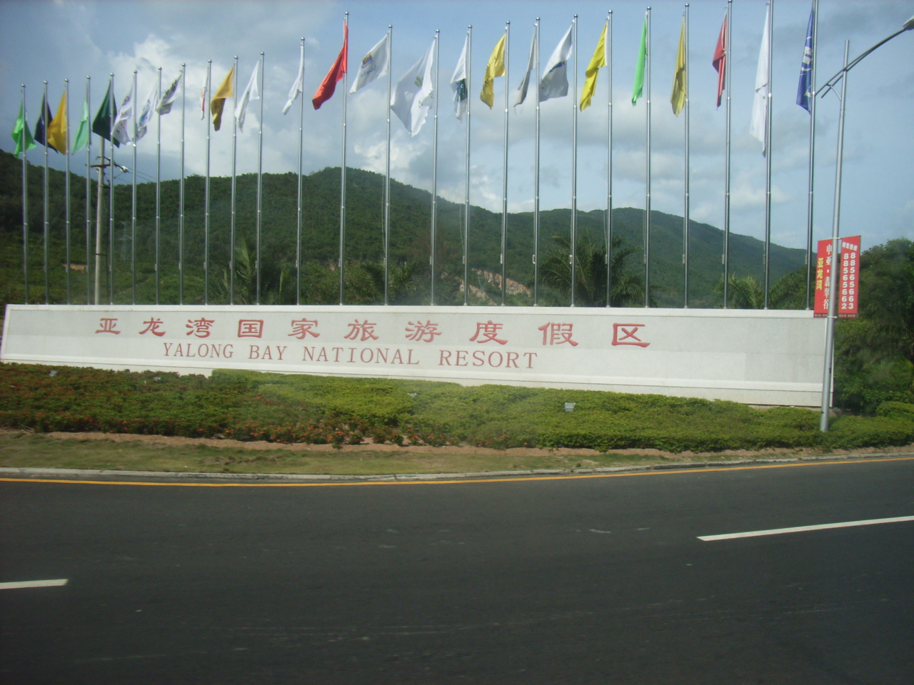 Yalong Bay National Resort, Sanya, Hainan Island, China User:HNPIX